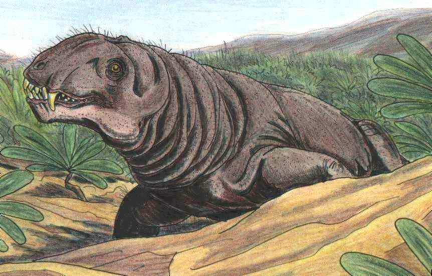 Dinocephalia